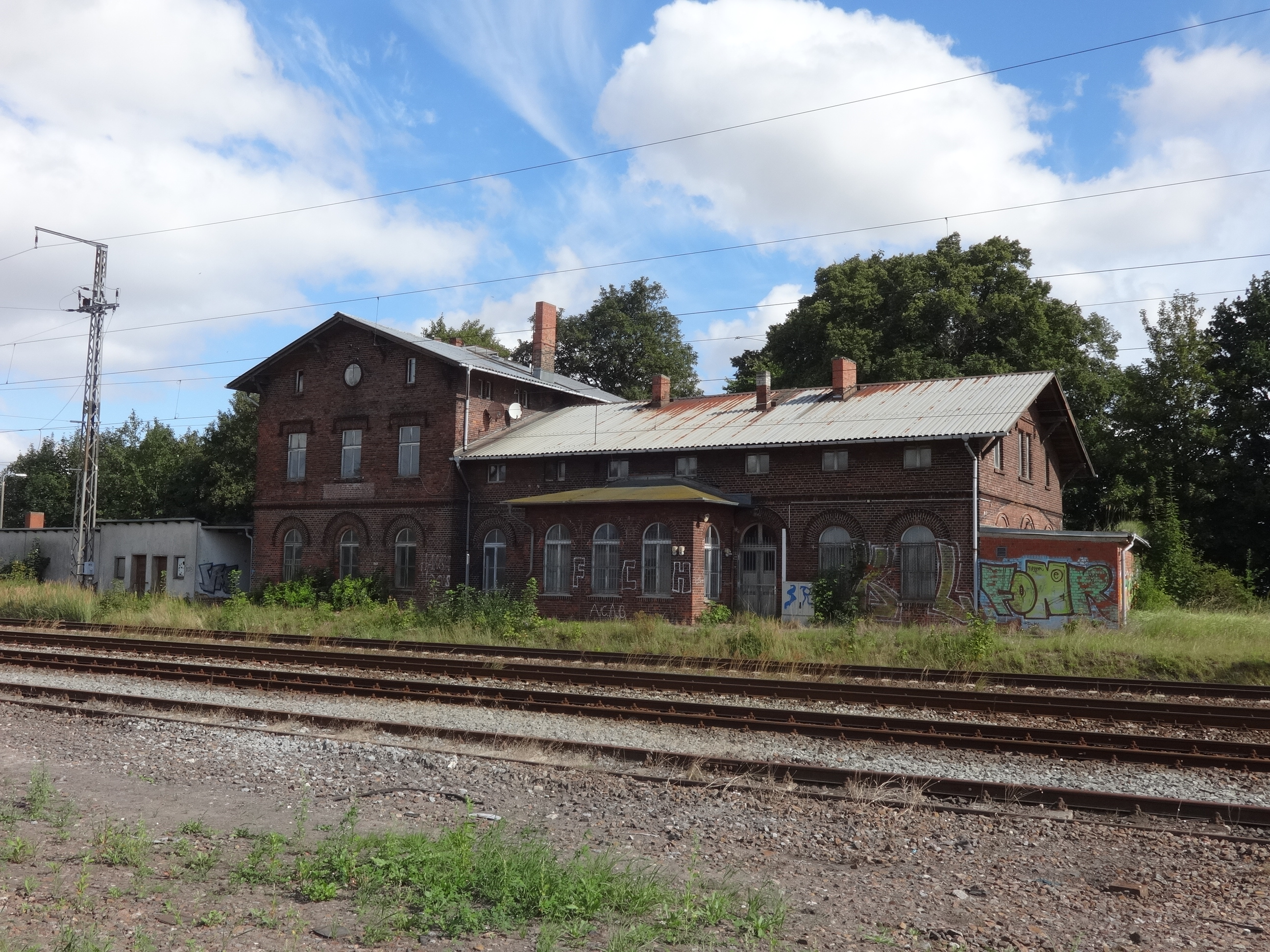 Denkmalgeschützte Gebäude in Miltzow, ein Ortsteil der Gemeinde Sundhagen in Mecklenburg-Vorpommern